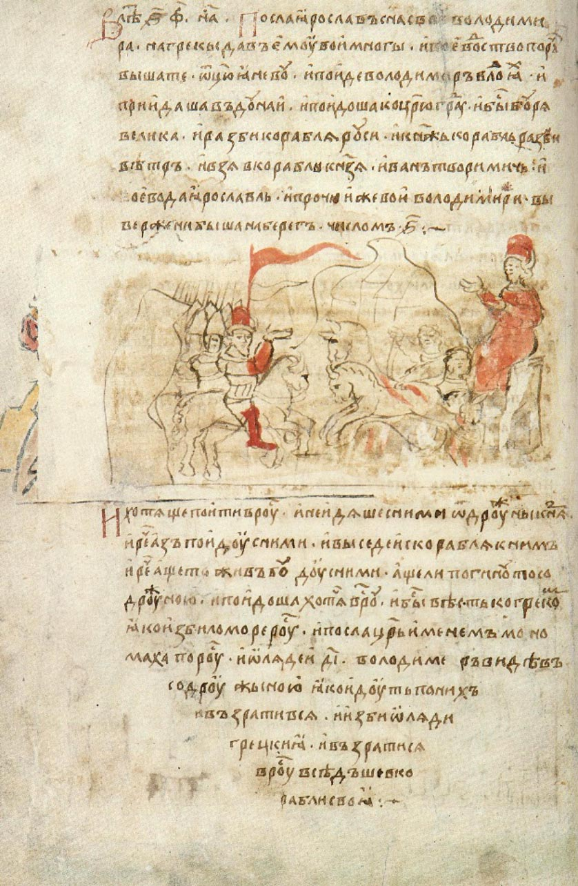 Радзивиловская летопись лист 186 Русско-византийская война 1043 года В год 6551 (1043). Послал Ярослав сына своего Владимира на греков и дал ему много воинов, а воеводство поручил Вышате, отцу Яня. И отправился Владимир в ладьях, и приплыл к Дунаю, и направился к Царьграду. И была буря велика, и разбила корабли русских, и княжеский корабль разбил ветер, и взял князя в корабль Иван Творимирич, воевода Ярослава. Прочих же воинов Владимировых, числом до 6000, выбросило на берег, и, когда они захотели было пойти на Русь, никто не пошел с ними из дружины княжеской. И сказал Вышата: "Я пойду с ними". И высадился к ним с корабля, и сказал: "Если буду жив, то с ними, если погибну, то с дружиной". И пошли, намереваясь дойти до Руси. И сообщили грекам, что море разбило ладьи руси, и послал царь, именем Мономах, за русью 14 ладей. Владимир же, увидев с дружиною своею, что идут за ними, повернув, разбил ладьи греческие и возвратился на Русь, сев на корабли свои.